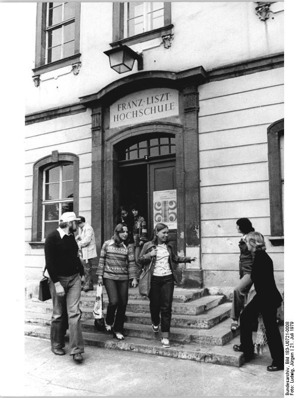 Weimar, Franz-Liszt-Hochschule für Musik ADN-ZB Ludwig-21.7.79 Bez. Erfurt: Reges KOmmen und Gehen herrscht dieser Tage an der weimarer Hochschule für Musik "Franz Liszt". Das XX. Internationale Musikseminar der DDR, verbunden mit einer Bach-Akademir des Musikrates der DDR, geht am 25.7.79 zu Ende. Mit rund 800 Teilnehmern aus etwa 20 Ländern ist das Seminar die umfangreichste Weiterbildungsveranstaltung seit Beginn der Sommerkurse im Jahre 1960. Die Meisterkurse werden von international geschätzten Solisten und Musikpädagogem aus dem In- und Ausland geleitet. (siehe 9N)